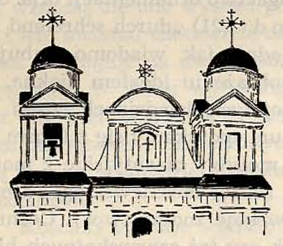 Беларуская (тарашкевіца): Лучай (Łučaj). Касьцёл Сьвятога Тадэвуша